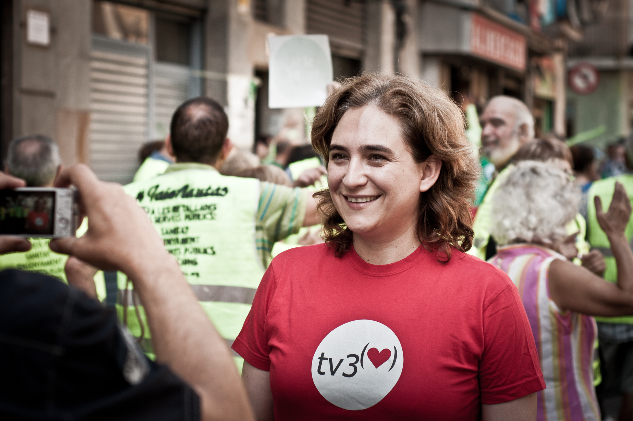 La portavoce del movimento, Ada Colau, con la maglietta a sostegno dei lavoratori della tv pubblica catalana, TV3, a rischio licenziamento dopo i tagli di bilancio.